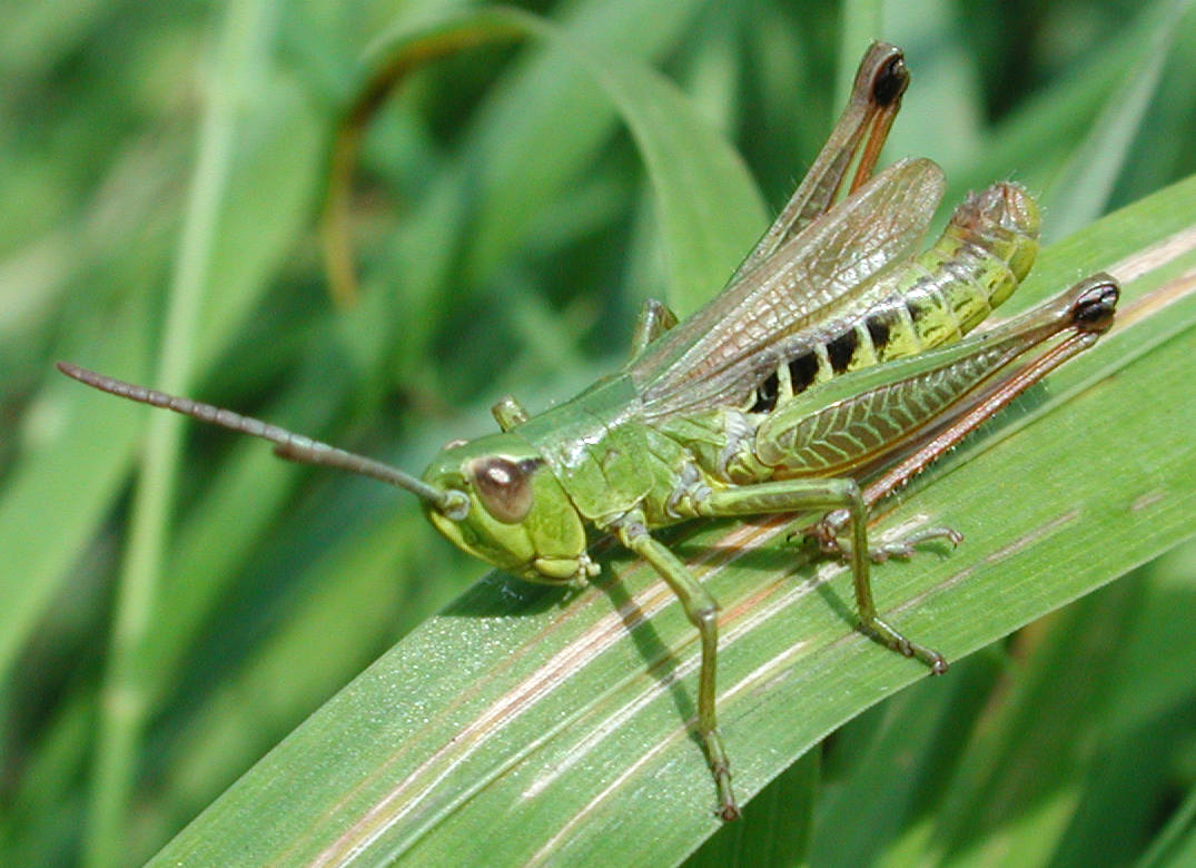 Chorthippus parallelus, m., Gemeiner Grashüpfer, NSG Kirchwerder Wiesen, Elbmarsch bei Hamburg, Deutschland